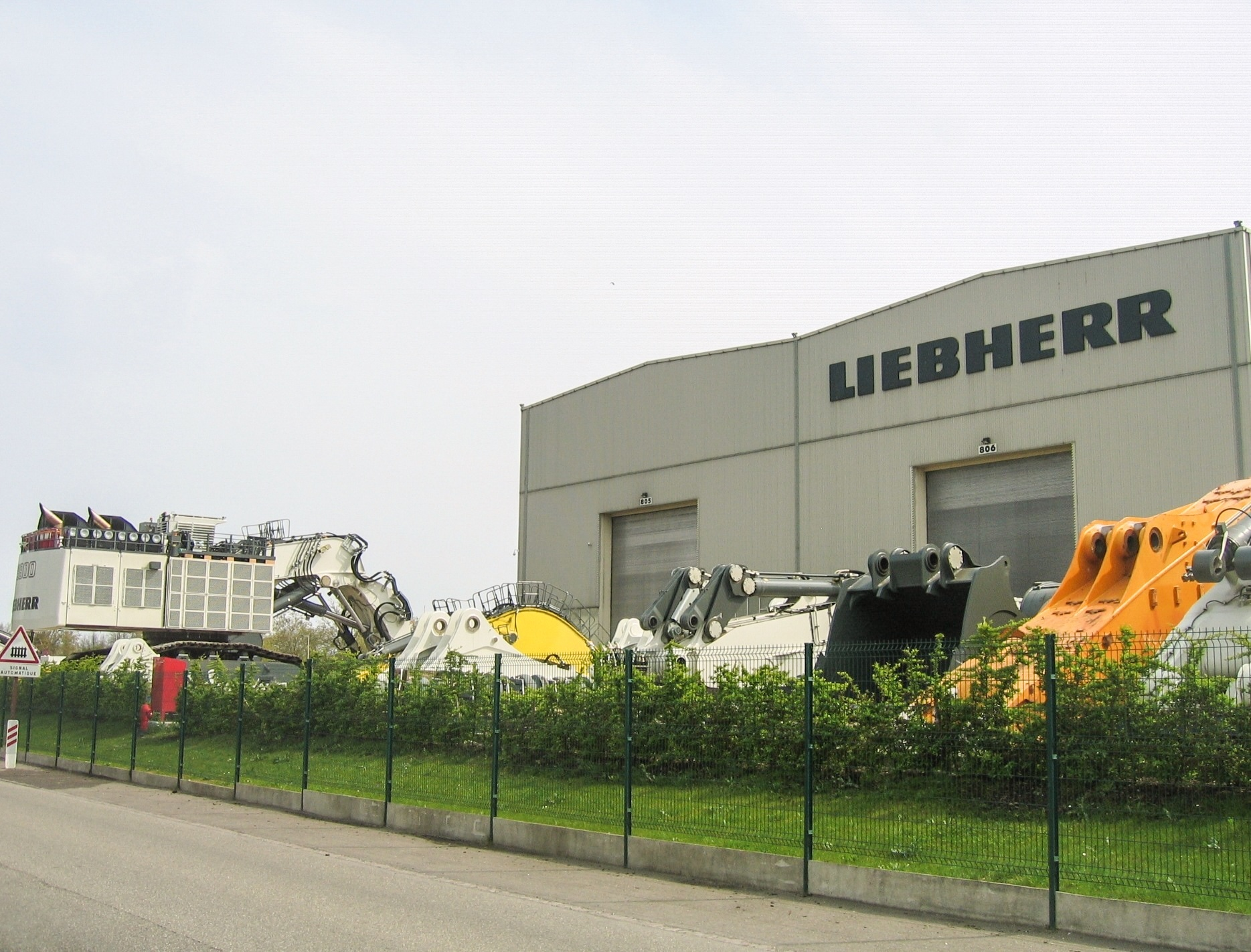 La partie nord de l'usine Liebherr de Colmar